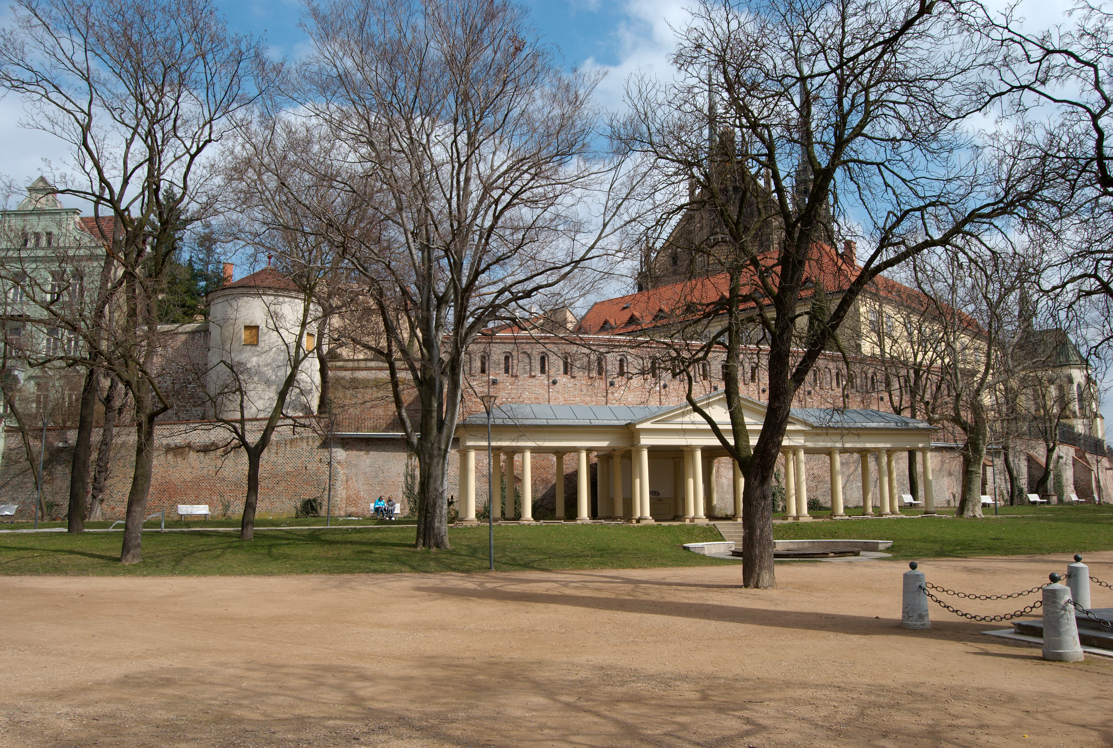 Dochovaný úsek středověkých brněnských hradeb u Petrova, nacházející se na okraji Denisových sadů